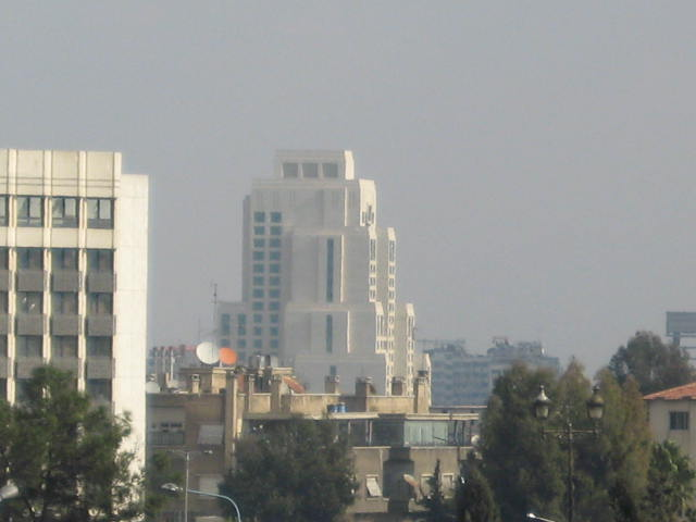 صورة لفندق فورسيزنز من مدينة باسل الأسد الجامعية في دمشق